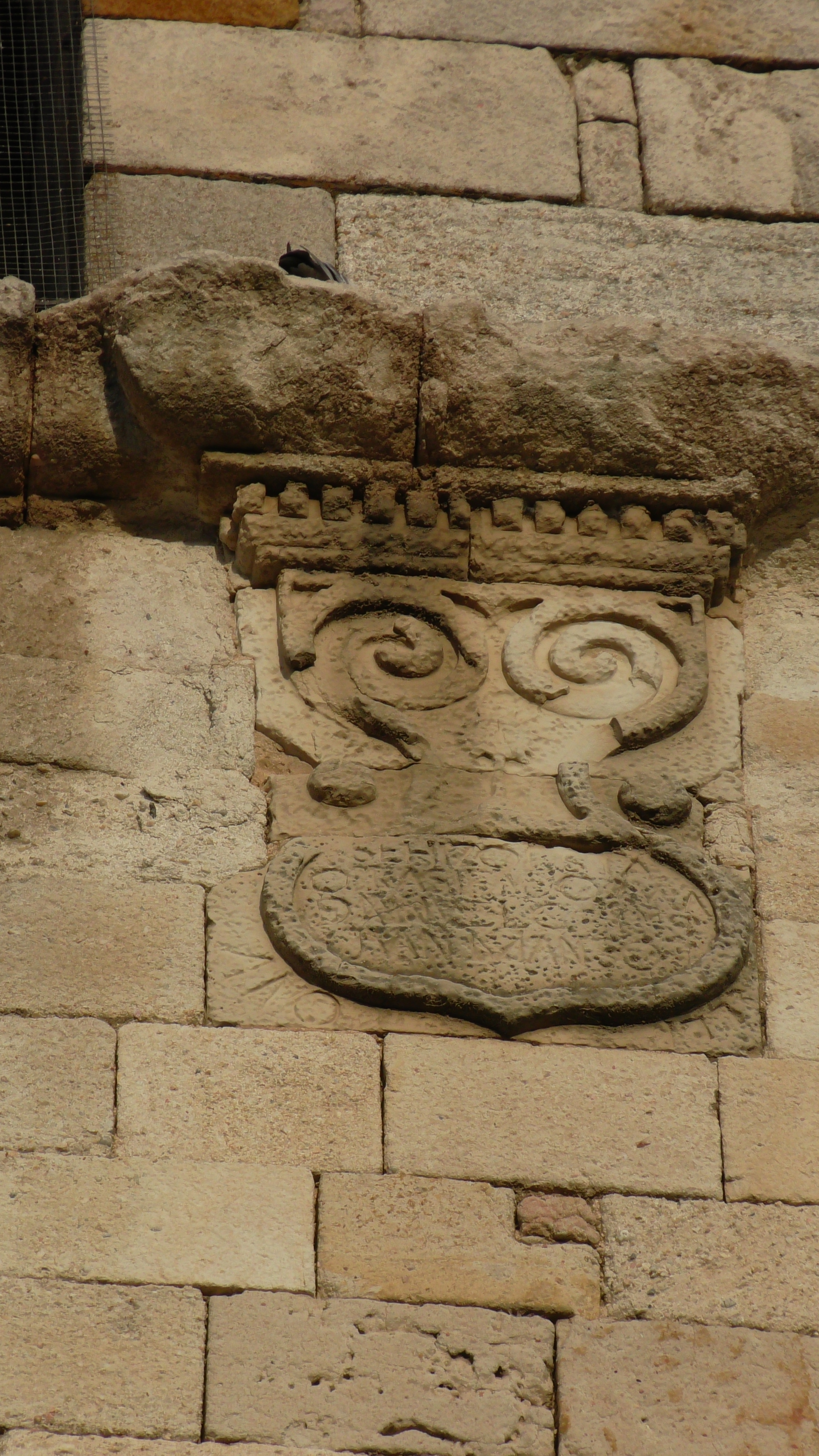 Villaralbo